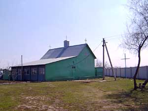 Храм св. Володимира Великого